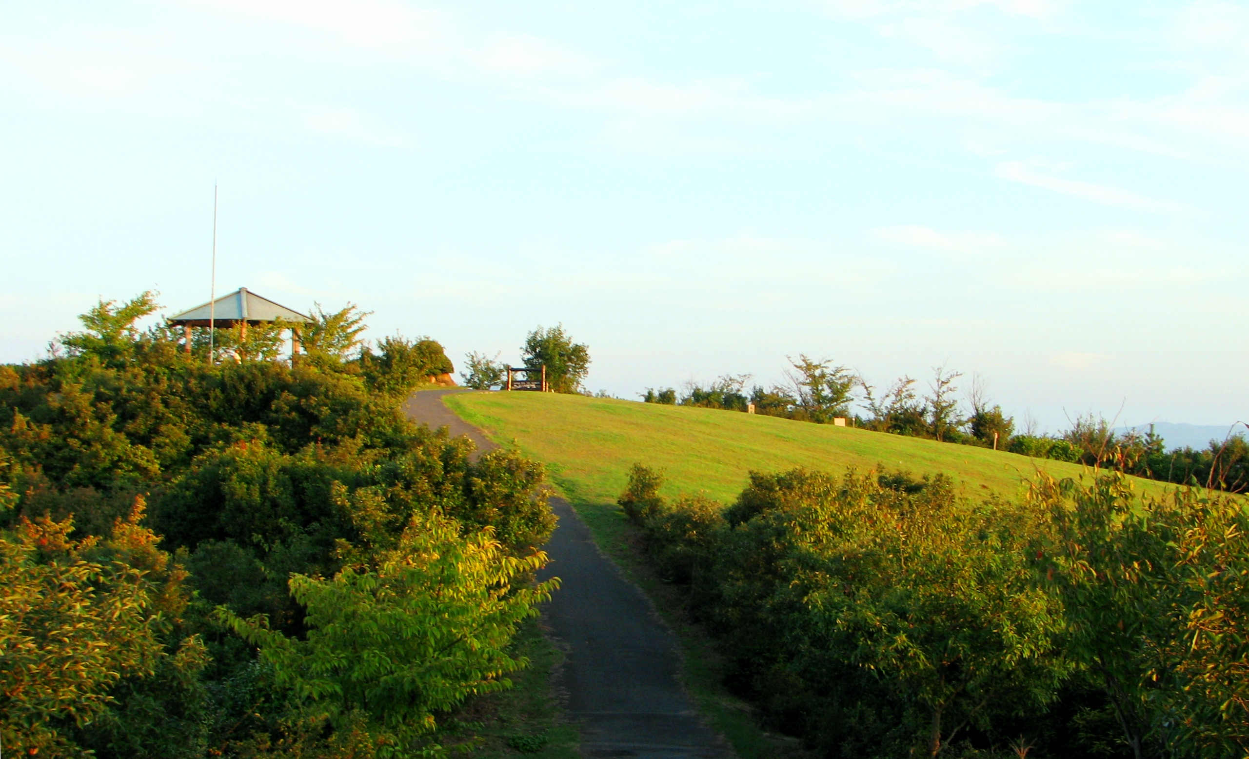 王子が岳 山頂 234.4ｍ ❀ 八人の 王子の伝説 春の山 （小原善郎）